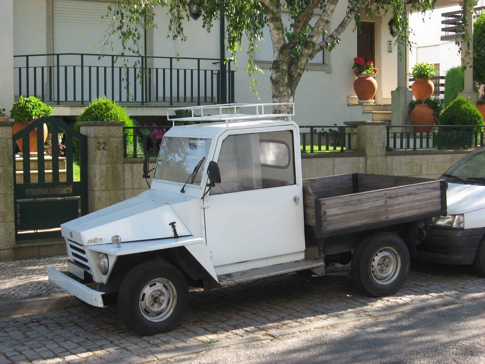 vehiculo fabricado localmente por patrocinio de gm motors